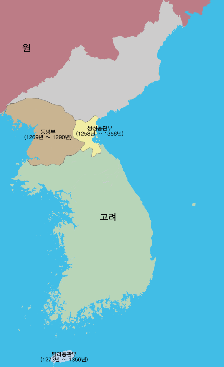 1269년 ~ 1273년 까지 손실된 영토를 보여줌.